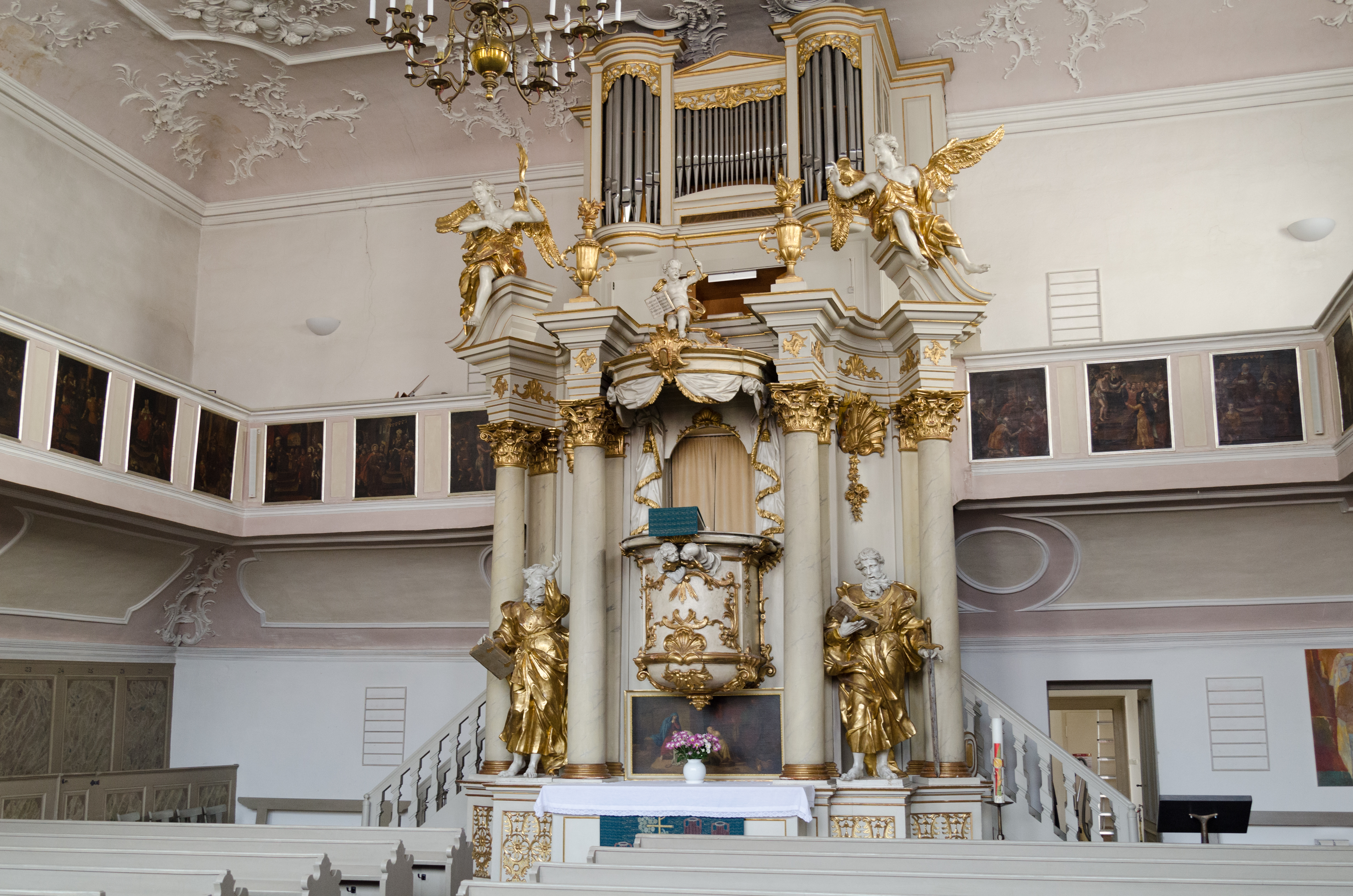 Bayreuth, Spitalkirche